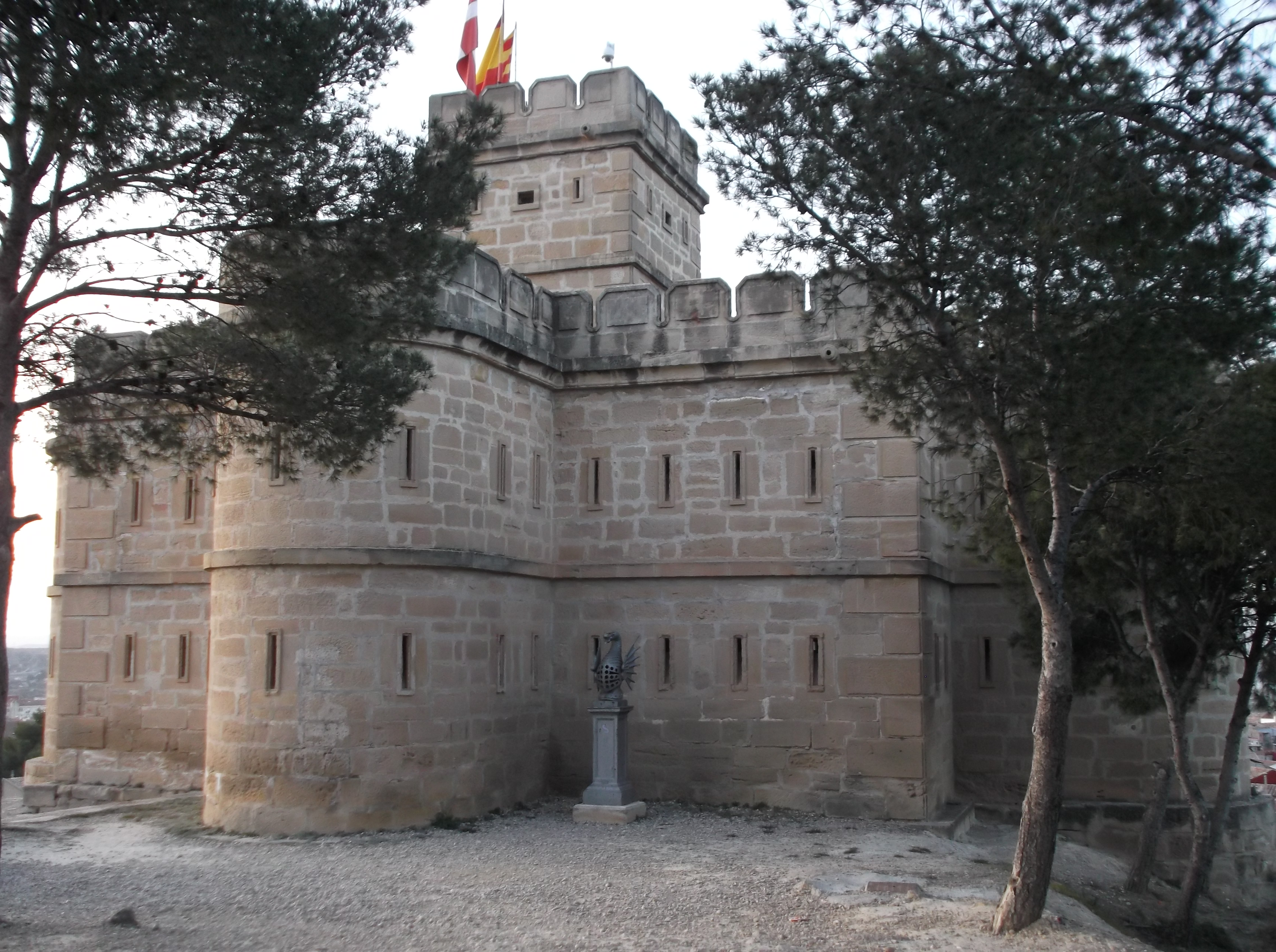 Torre de Salamanca (Caspe, Aragón), Es un fuerte fusilero cuya construcción se inició en 1875 por orden del general Manuel de Salamanca Negrete debido a la necesidad defensiva de la población ante las Guerras Carlistas.